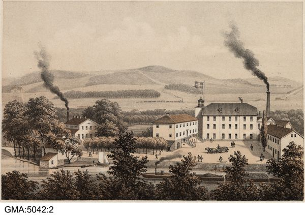 Gamlestadens spinneri, tidigare Sahlgrenska sockerbruket, grafiskt blad från cirka 1854, Bildsamlingen vid Göteborgs stadsmuseum.